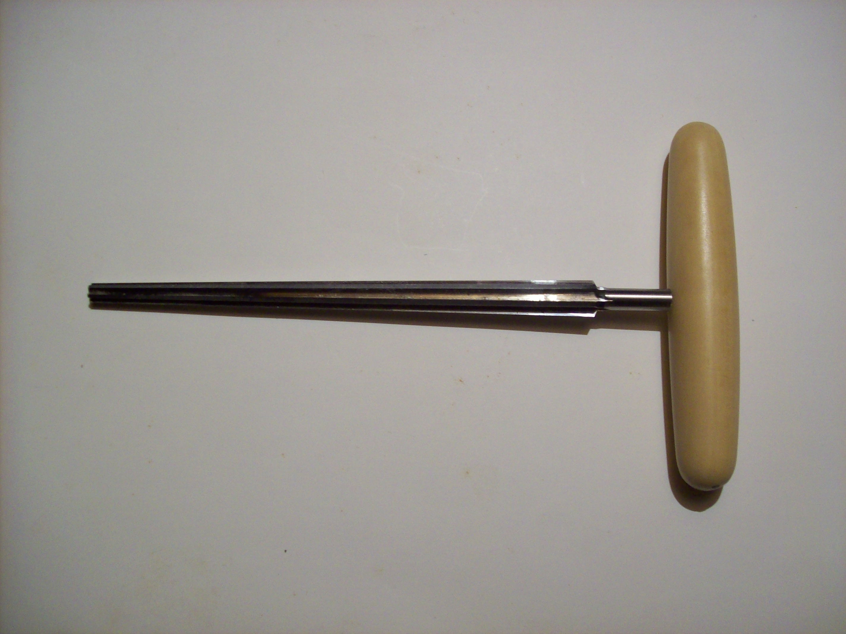 Reibahle für Violine